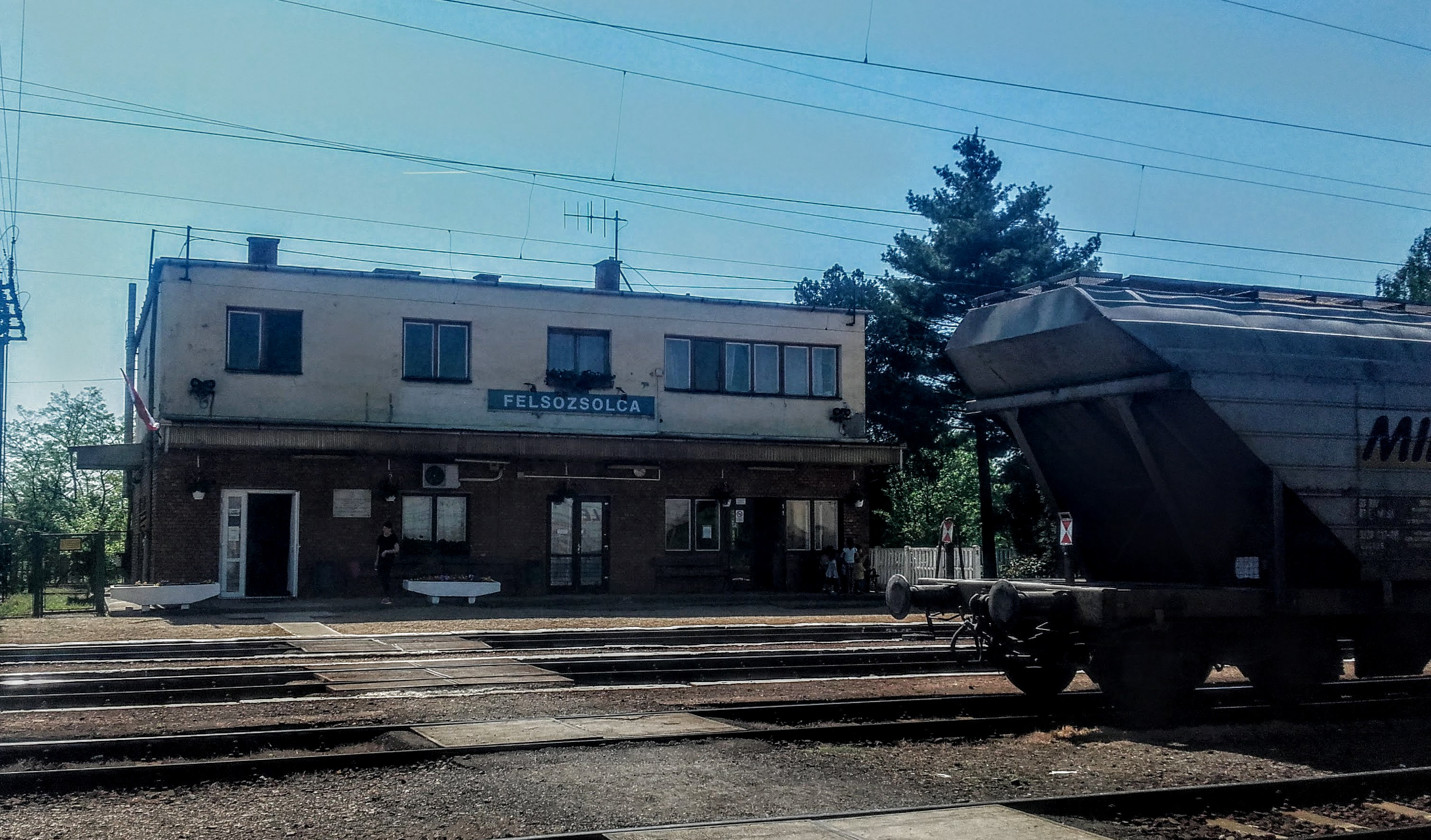 Train station in Felsőzsolca, Hungary, on a route from Hatvan, and on a route from Miskolc, with a freight train in the foreground.